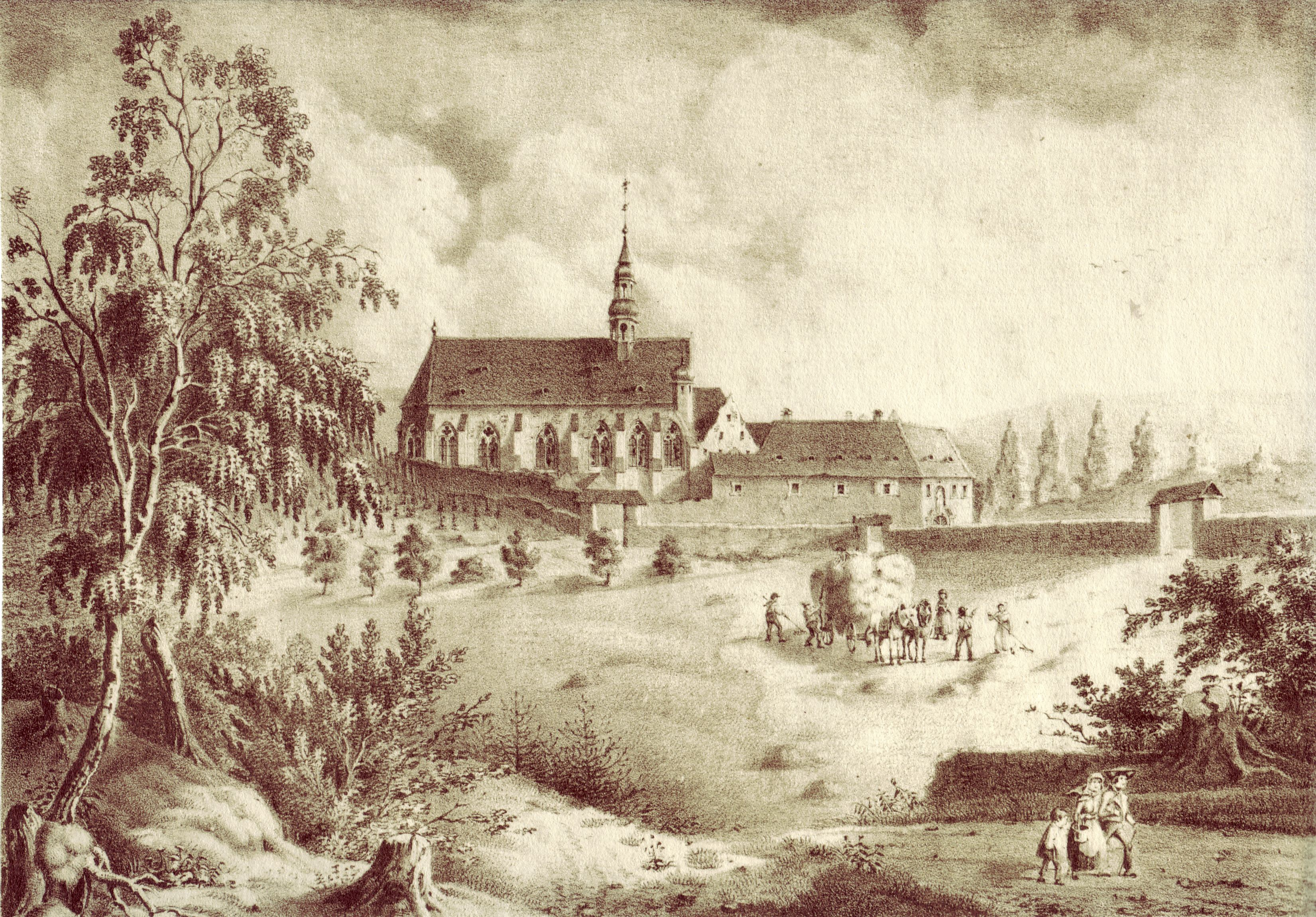 [Originalbeschreibung] Die Kirche und das Kloster Maria Dahlheim lag auf der Westseite von Mainz zwischen Zahlbach und der Dahlheimer Mühle im Thale , früher Heiligenthal genannt. Es war die erste christliche Kirche in unserer Gegend. Im 13. Jahrhundert war das Kloster eine Zeit lange ein Doppel-Kloster von Mönchen und Nonnen. Sowohl durch Überschwemmungen, wobei die Klostermauern niedergerissen wurden und Menschen ertranken, als auch durch Kriege erlitt es mehrere Zerstörungen wonach das Kloster immer wieder hergestellt wurde bis zur Belagerung von 1793 wo die Franzosen noch den Rest seiner Mauern zur Vertheidigung brauchten, worauf es endlich gänzlich verschwand.